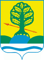 Герб города Красный Сулин